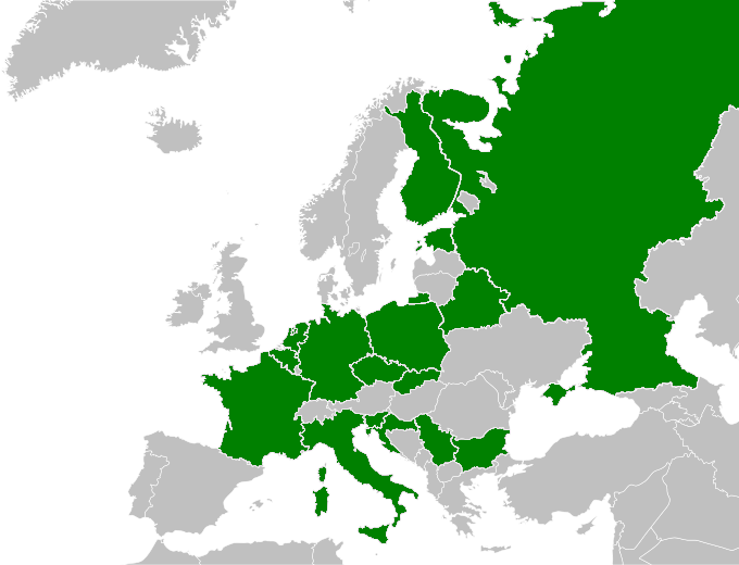 Reprezentacje biorące udział w Mistrzostwach Europy w Piłce Siatkowej Mężczyzn 2015.